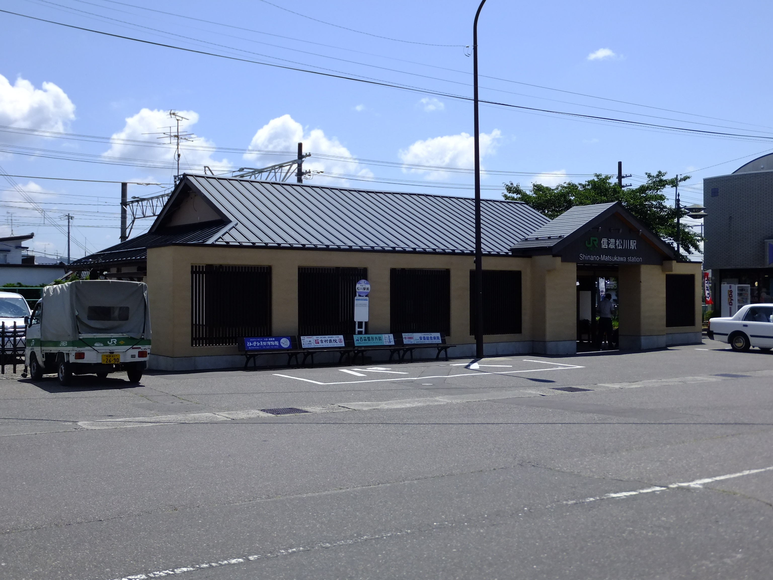 大糸線信濃松川駅駅舎。2010年に美装化工事が行われた。